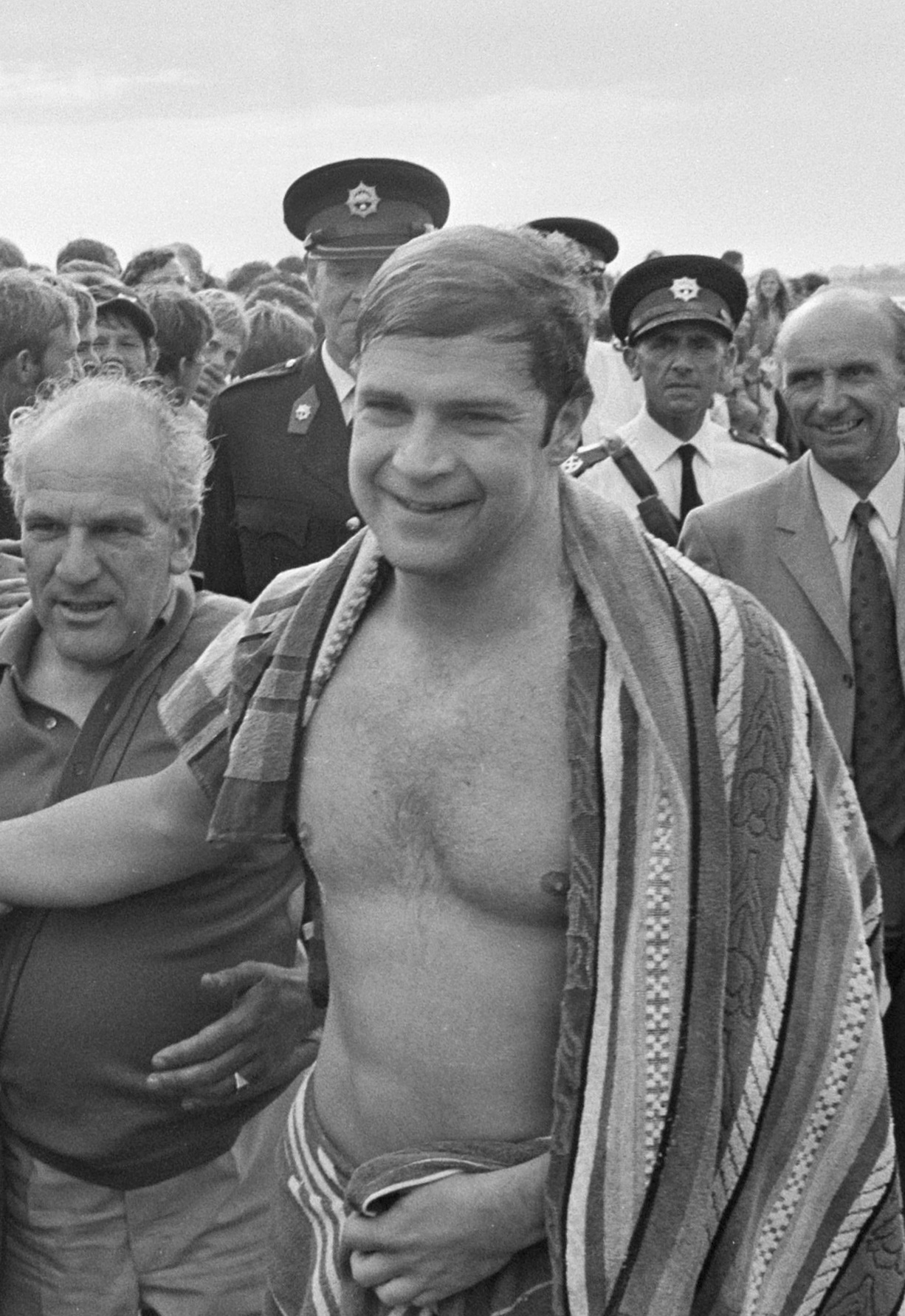 Winnaar Horacio Iglesias wordt gefeliciteerd door publiek